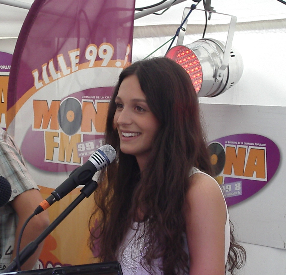 Pauline lors d'une émission Radio à Lille